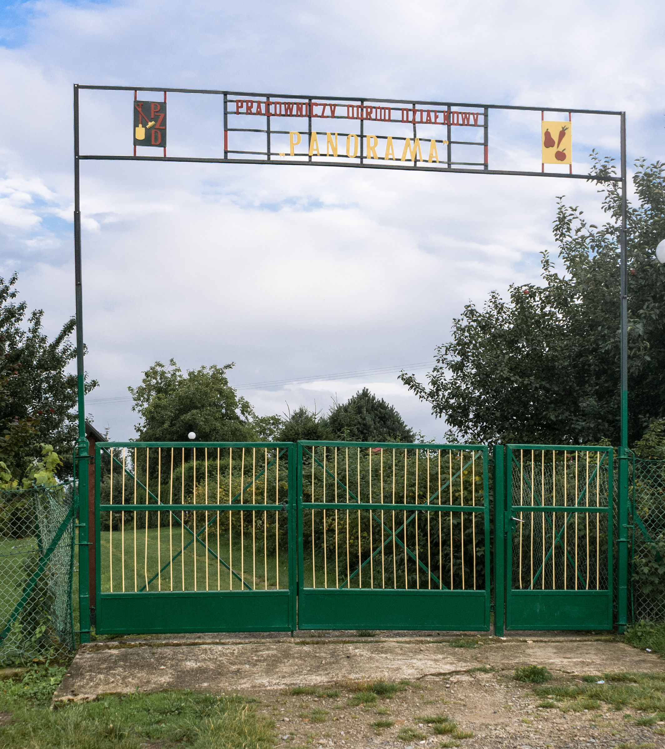 Pracowniczy Ogród Działkowy Panorama przy ul. Okrzei w Krośnie